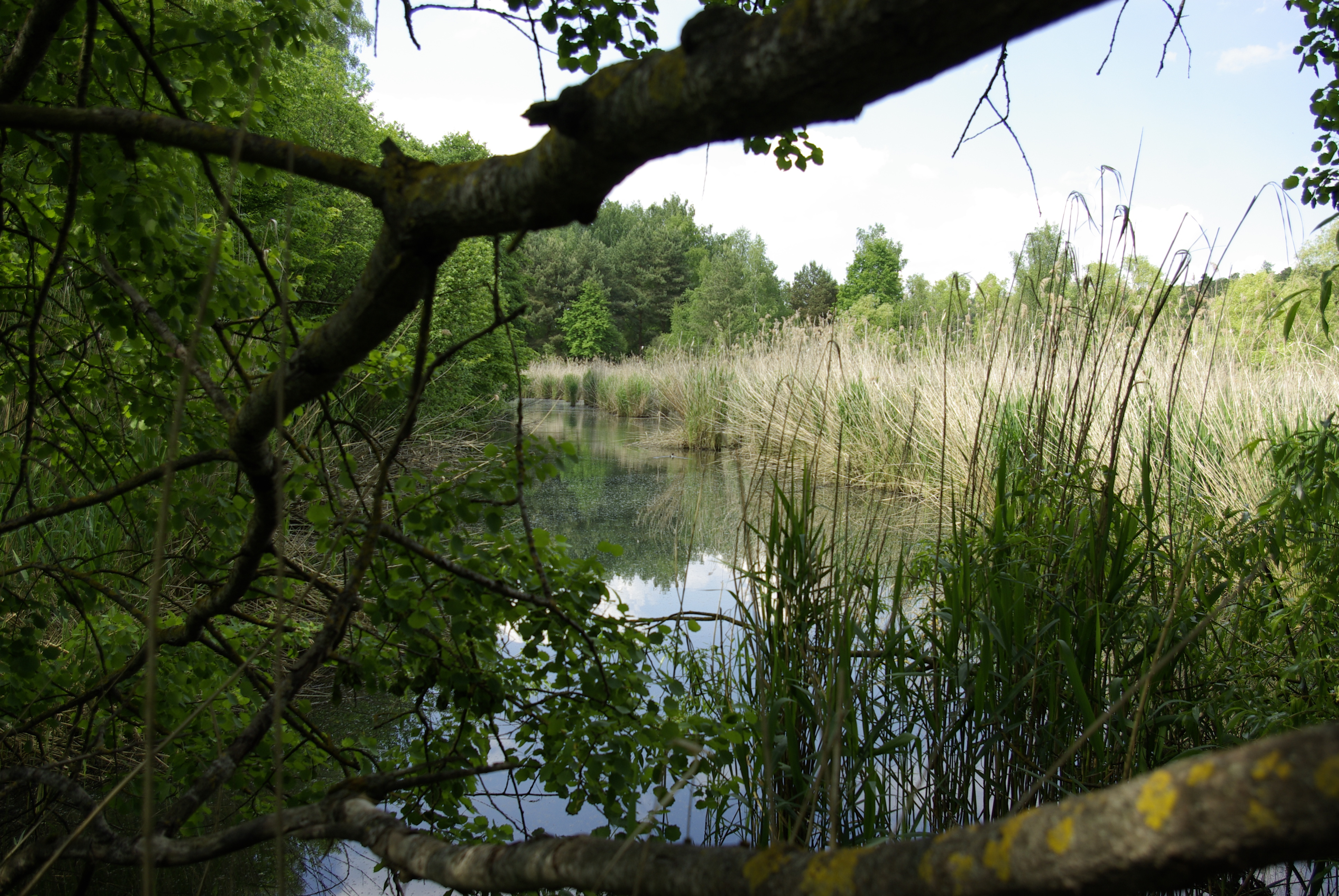 Einer der dem Großen Bischofsweiher (Dechsendorfer Weiher) vorgelagerten Weiher im Norden des Erlanger Stadtteils Dechsendorf.